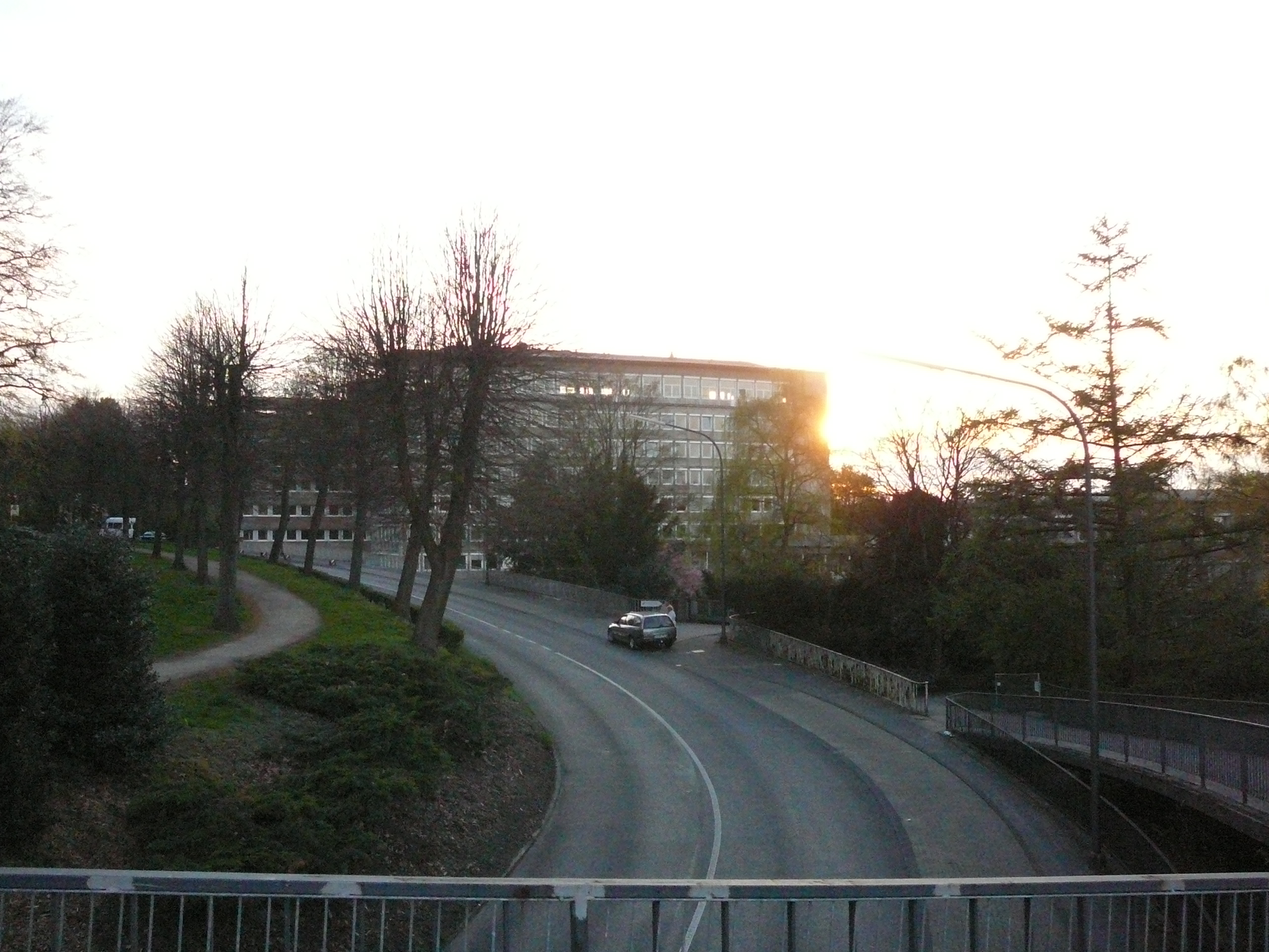 Untere Lichtenplatzer Straße, Wuppertal